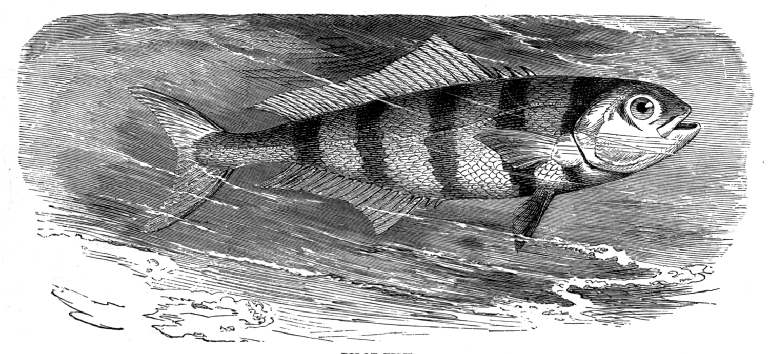 Naucrates ductor